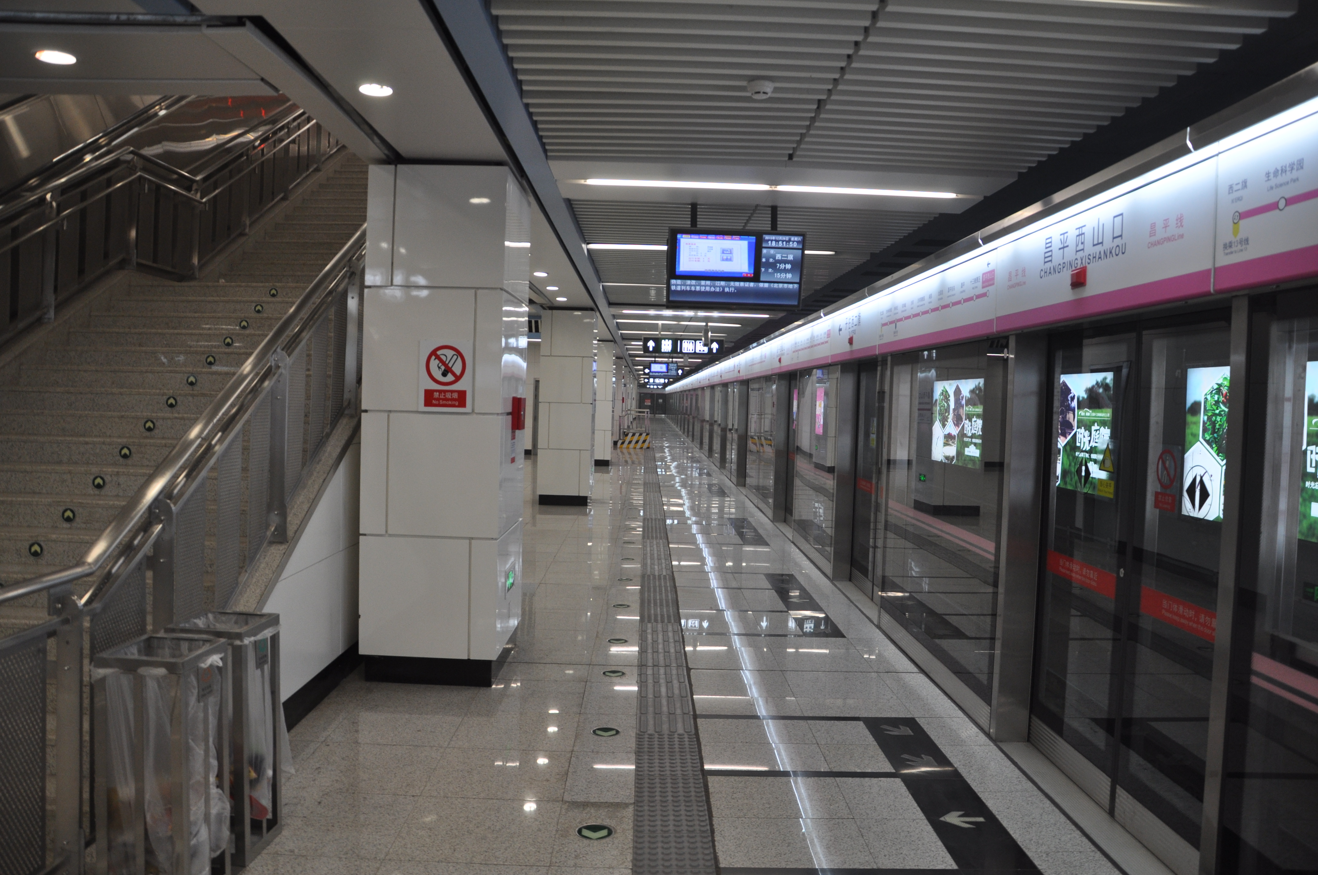 北京地铁昌平线昌平西山口站站台。